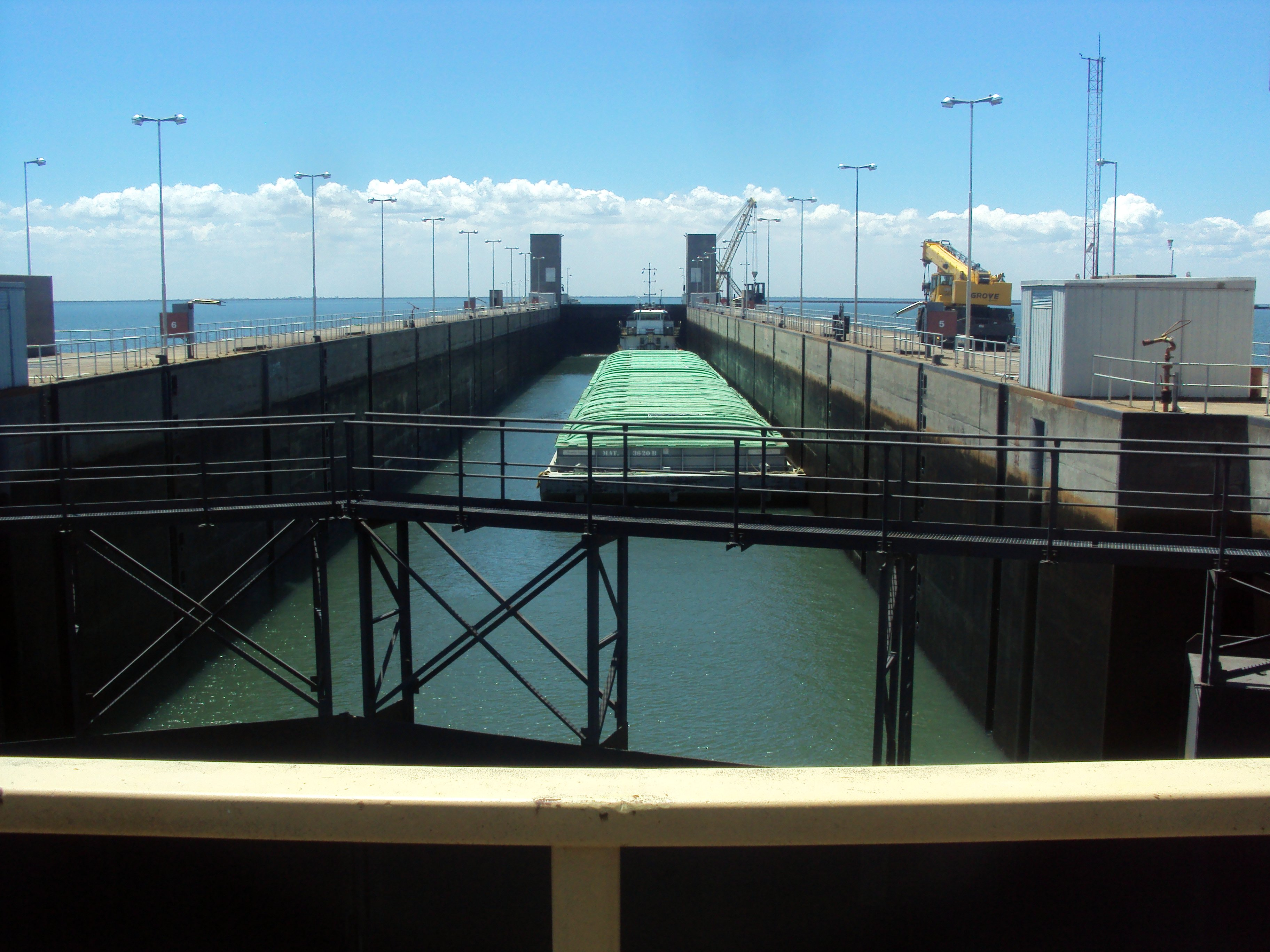 Barco dentro de la esclusa